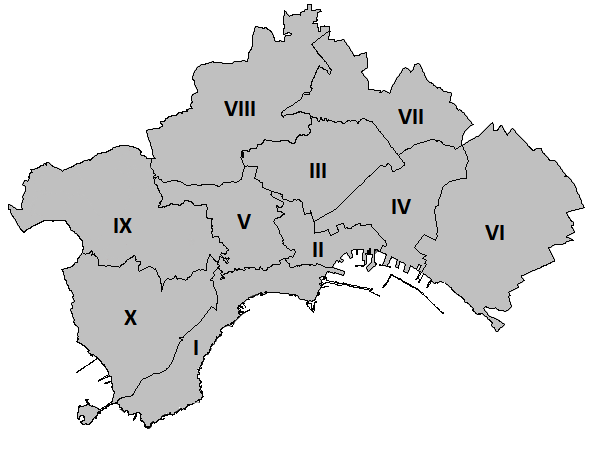 Mappa che mostra le municipalità di Napoli I - Chiaia - Posillipo - S.Ferdinando II - Avvocata - Montecalvario - S.Giuseppe - Porto - Mercato - Pendino III - Stella - S.Carlo all'Arena IV - S.Lorenzo - Vicaria - Poggioreale - Zona Industriale V - Arenella - Vomero VI - Barra - Ponticelli - S.Giovanni a Teduccio VII - Miano - S.Pietro a Patierno - Secondigliano VIII - Chiaiano - Piscinola Marianella - Scampia IX - Pianura - Soccavo X - Bagnoli - Fuorigrotta